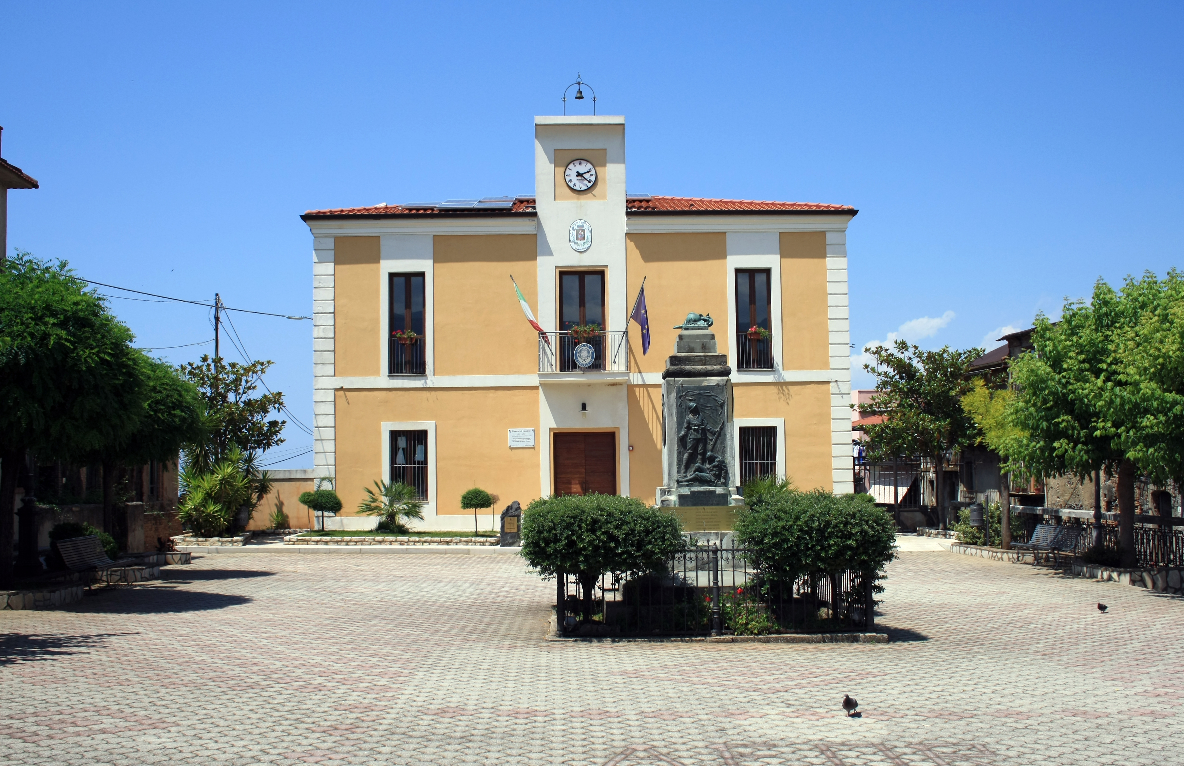 Sede del comune di Cosoleto